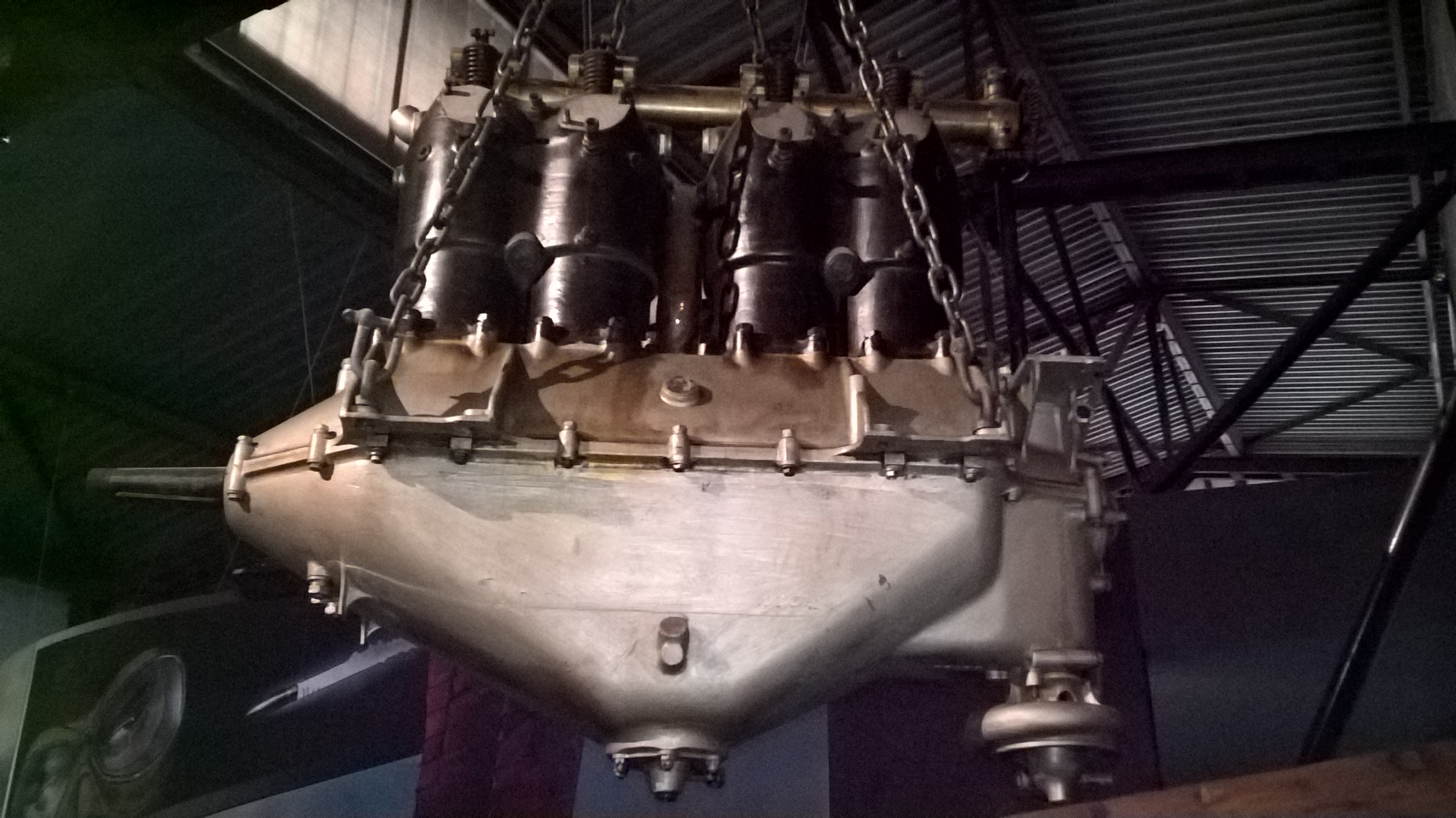 Niemiecki 4-cylindrowy silnik rzędowy Mercedes E 4F z 1910 r., eksponowany w Muzeum Lotnictwa Polskiego w Krakowie.